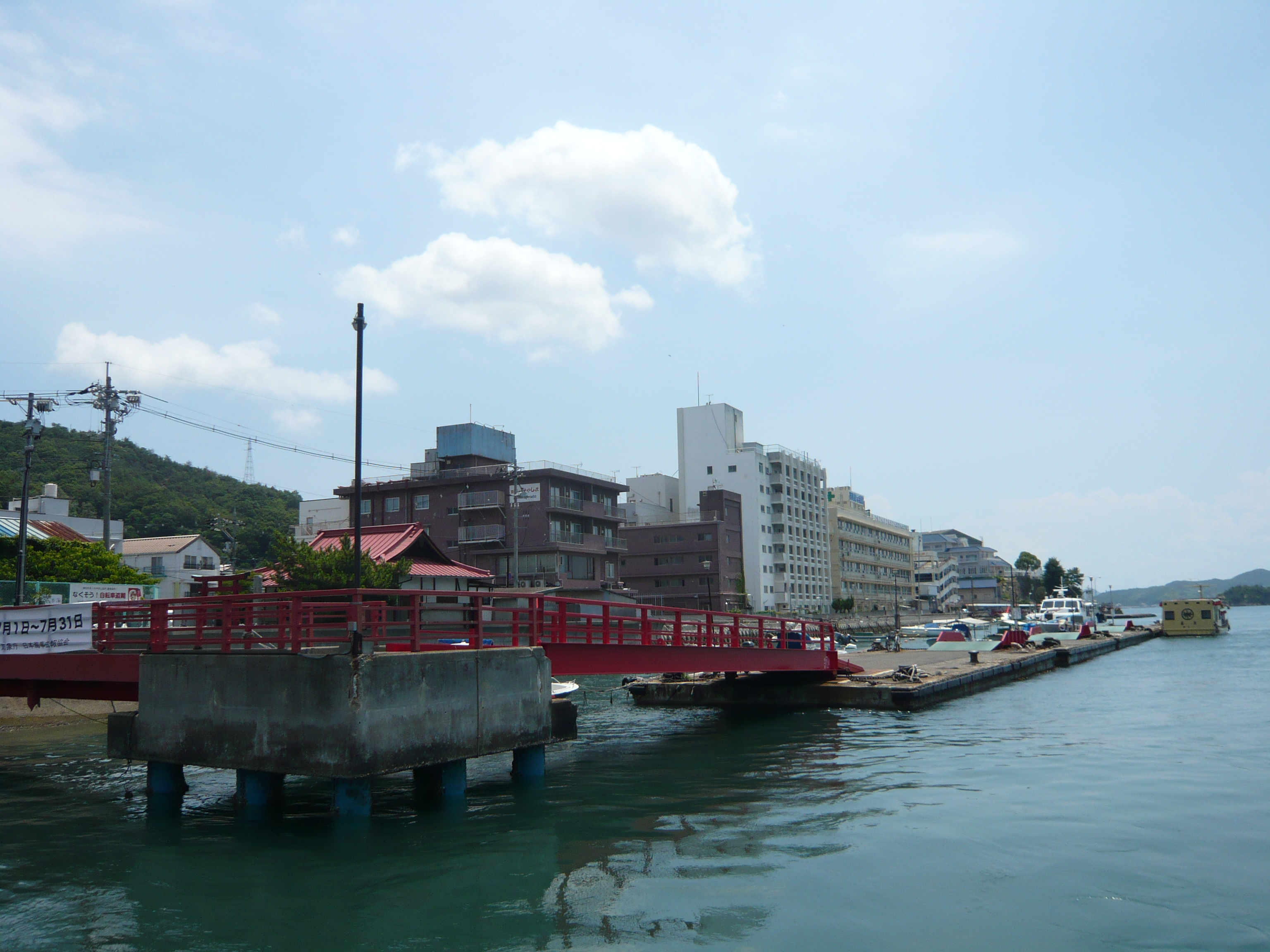 旧因島市街中心部の土生港周辺